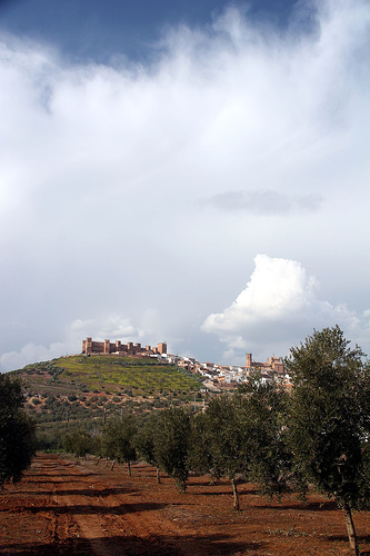 Vista del castillo de Baños de la Encina, Jaén, Andalucía, España